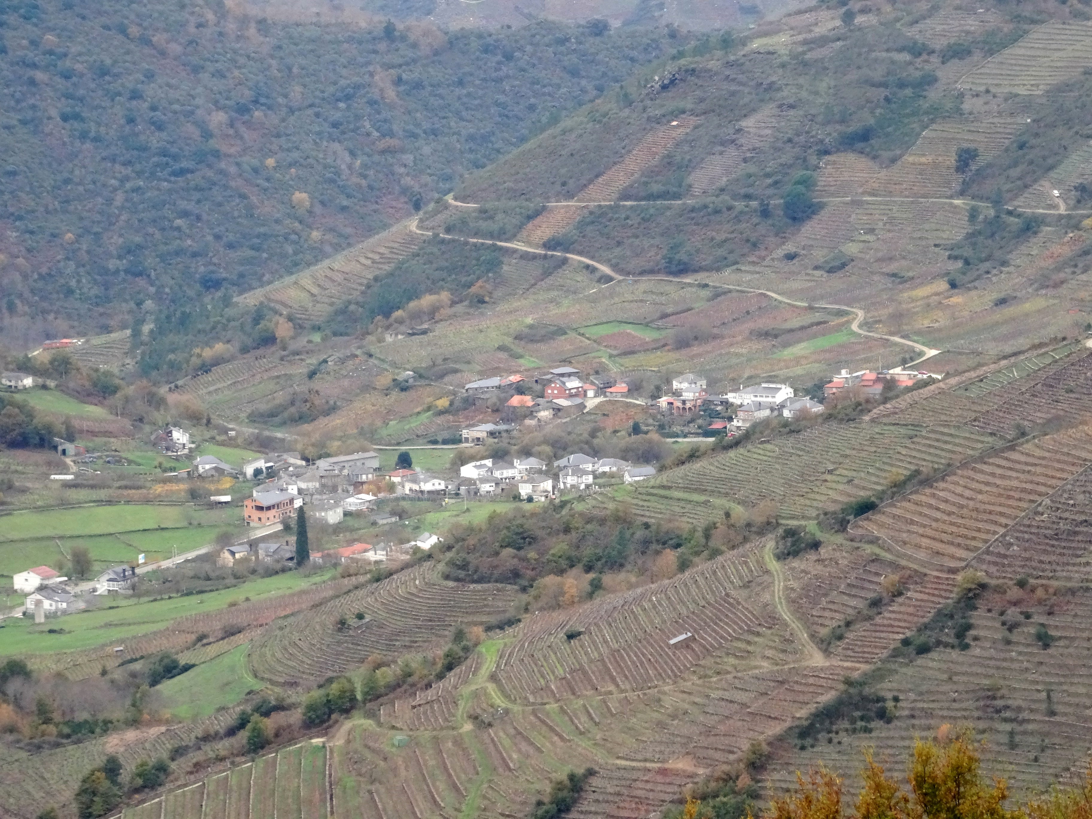 Ver título.